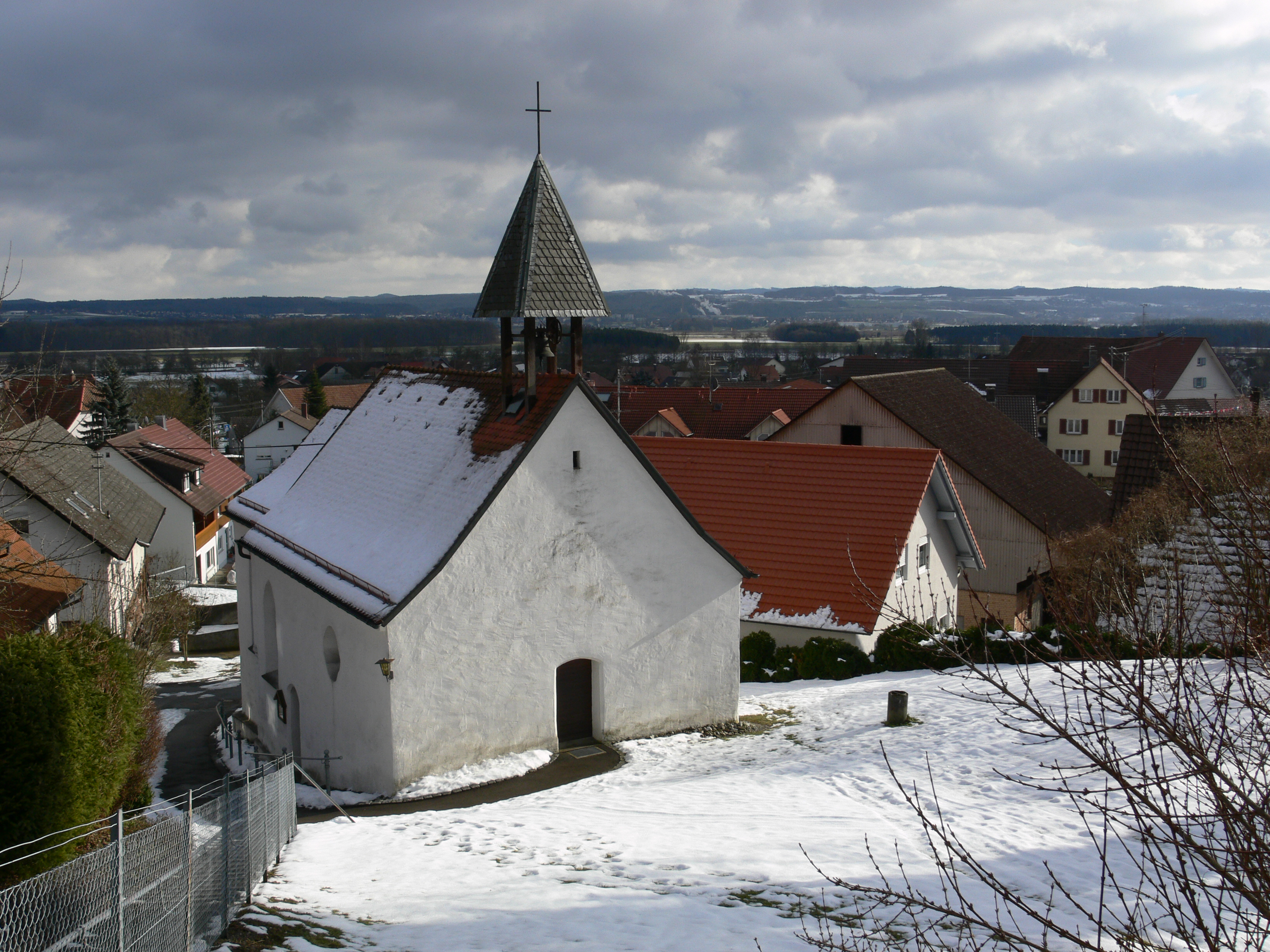 Staig, Ortsteil von Fronreute, Kreis Ravensburg, Baden-Württemberg, Deutschland Wallfahrtskapelle Staig